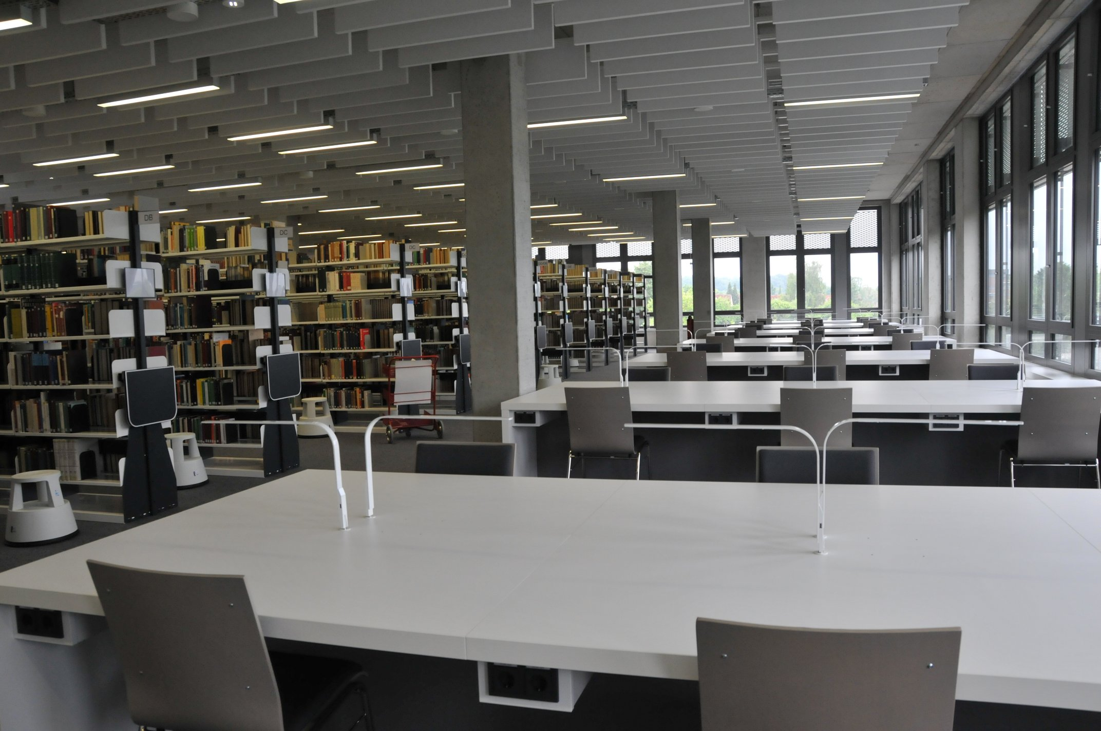 Fachbibliotheken im Gebäude X